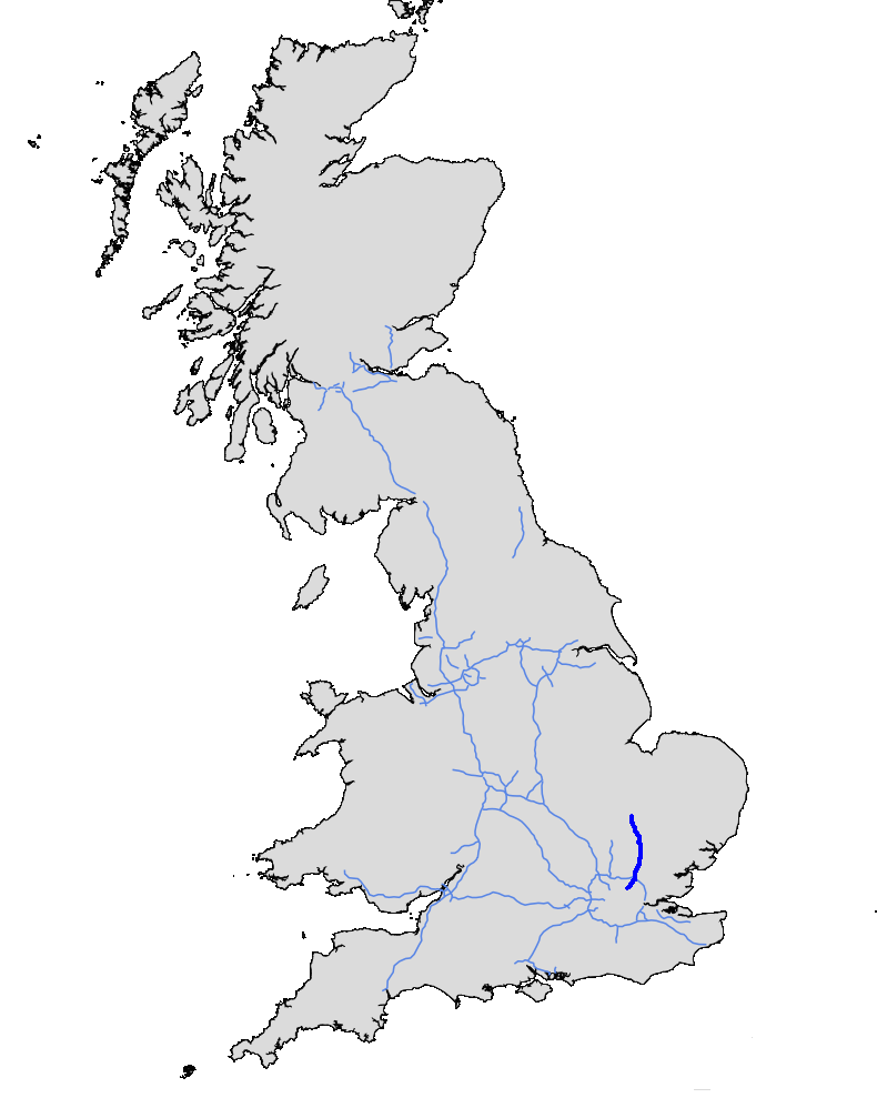 M11